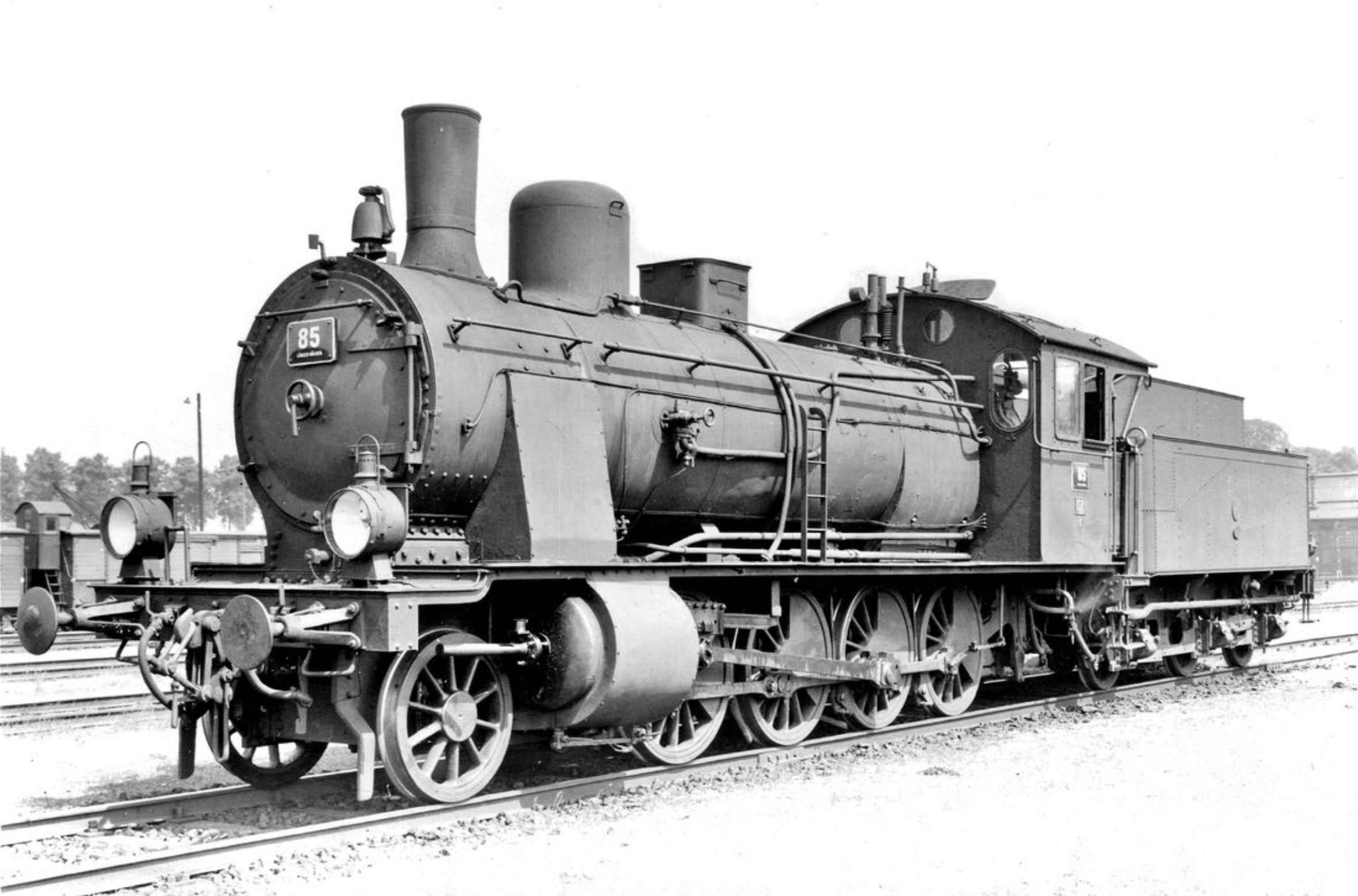 Lokomotive Nr. 85 der Lübeck-Büchener Eisenbahn (preußische Bauart G 7.3; Baujahr 1917, 1922 von der LBE aus Beständen der preußischen Staatsbahnen angekauft, 1938 56 001 der Deutschen Reichsbahn